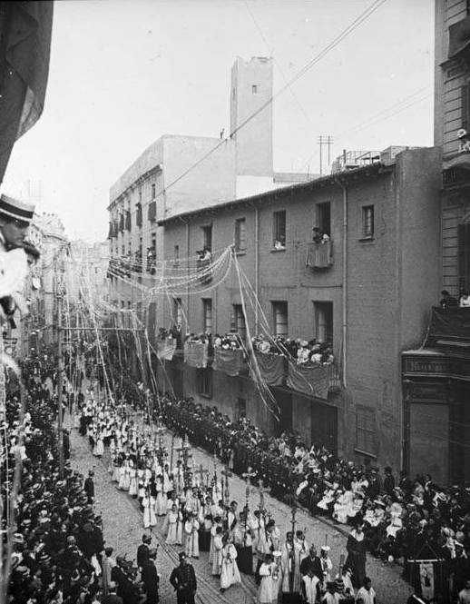 Imatge